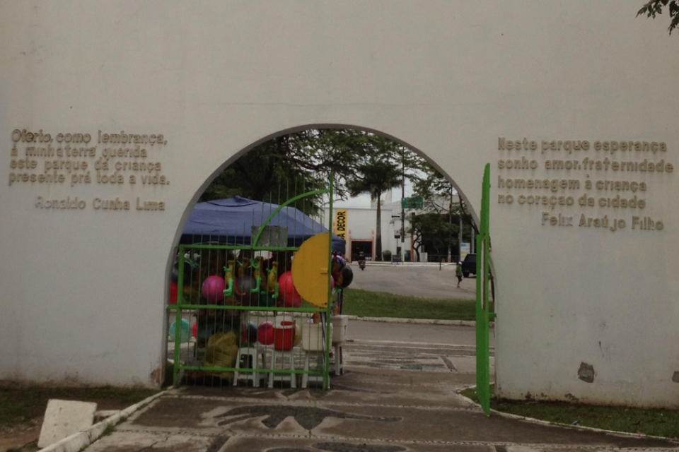 Parque da Criança, construído na administração do Prefeito Felix Araújo no ano de 1993. Versos do Governador Ronaldo Cunha Lima e do Prefeito Felix Araújo.